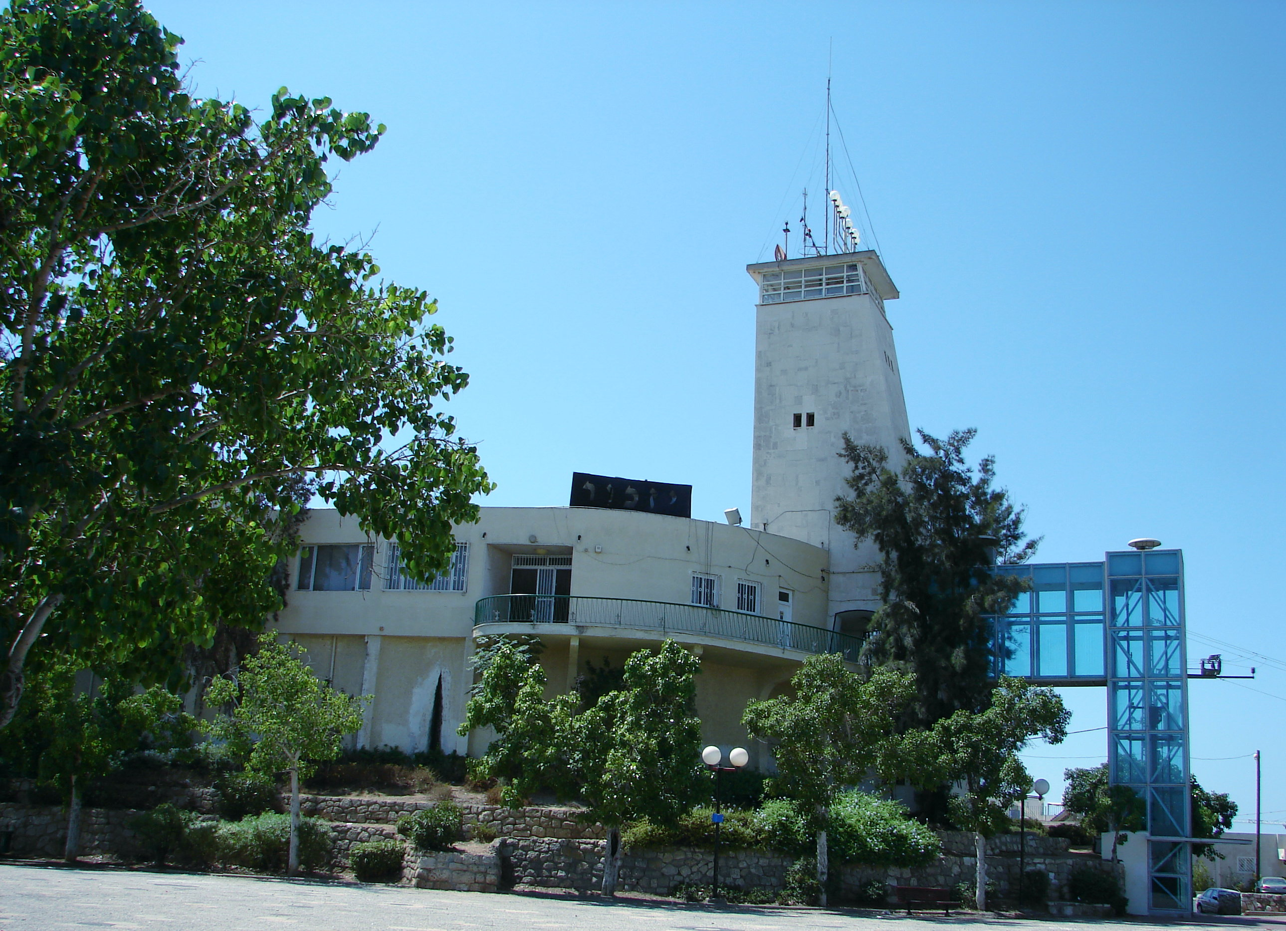 Yad Labanim in Ramat Gan